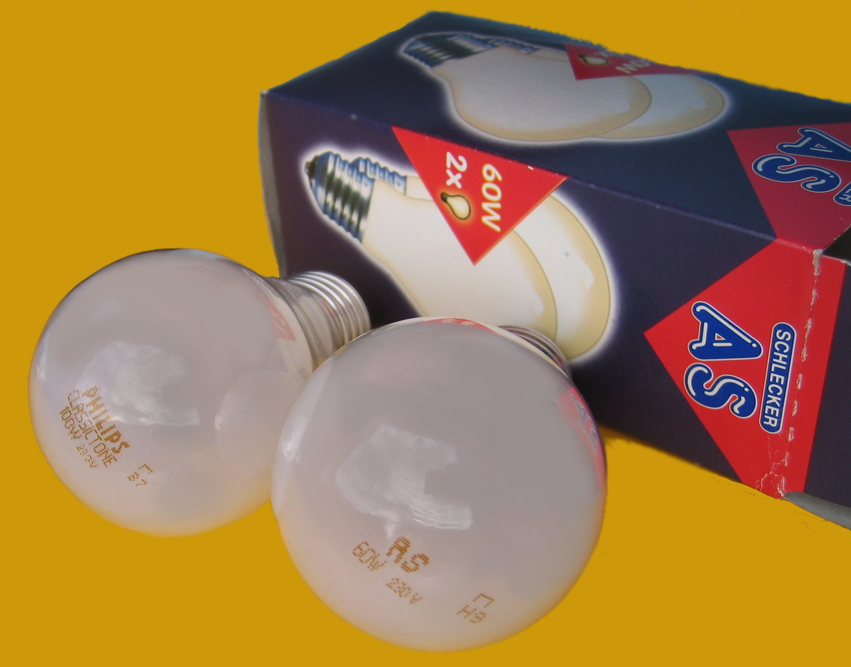 Handelsmarke „AS“ von Schlecker E27 60W Glühbirne Eigenmarke hergestellt von Philips